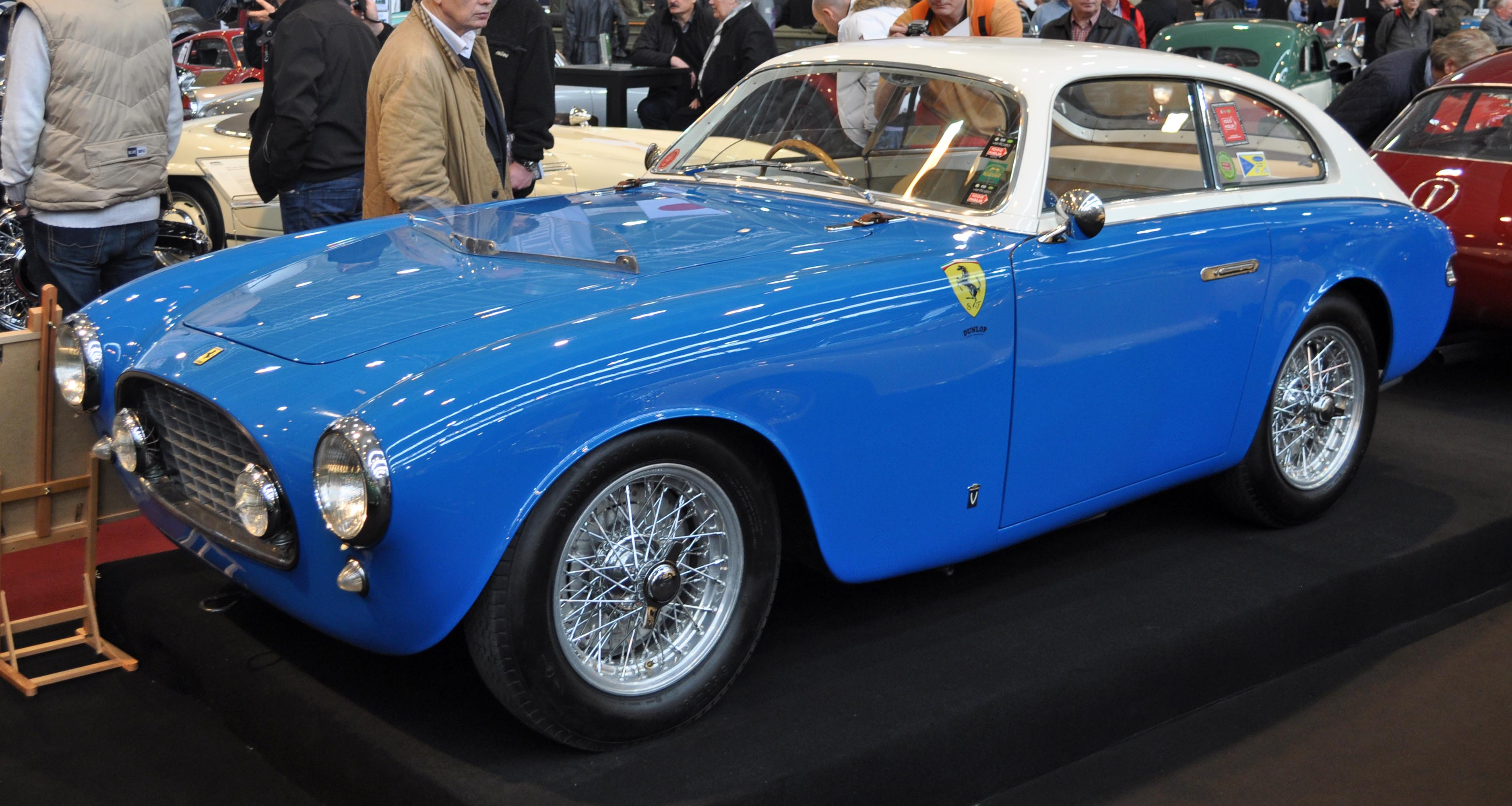 Ferrari 225S auf der Technoclassica 2013 in Essen